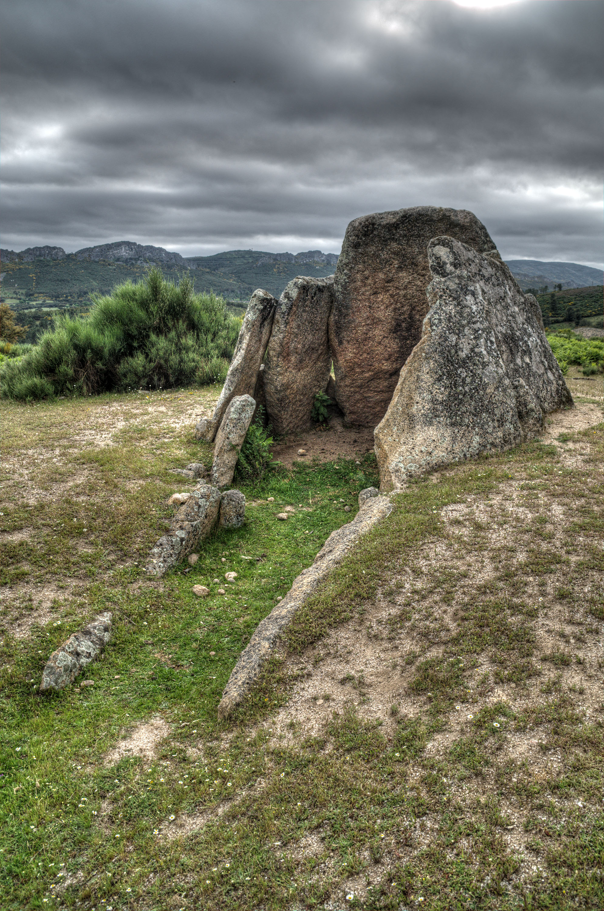 Dolmen de granito con cámara y un corredor corto. Cronología: IV-III milenio. Situado en las cercanías de La Aceña de la Borrega, Cáceres.